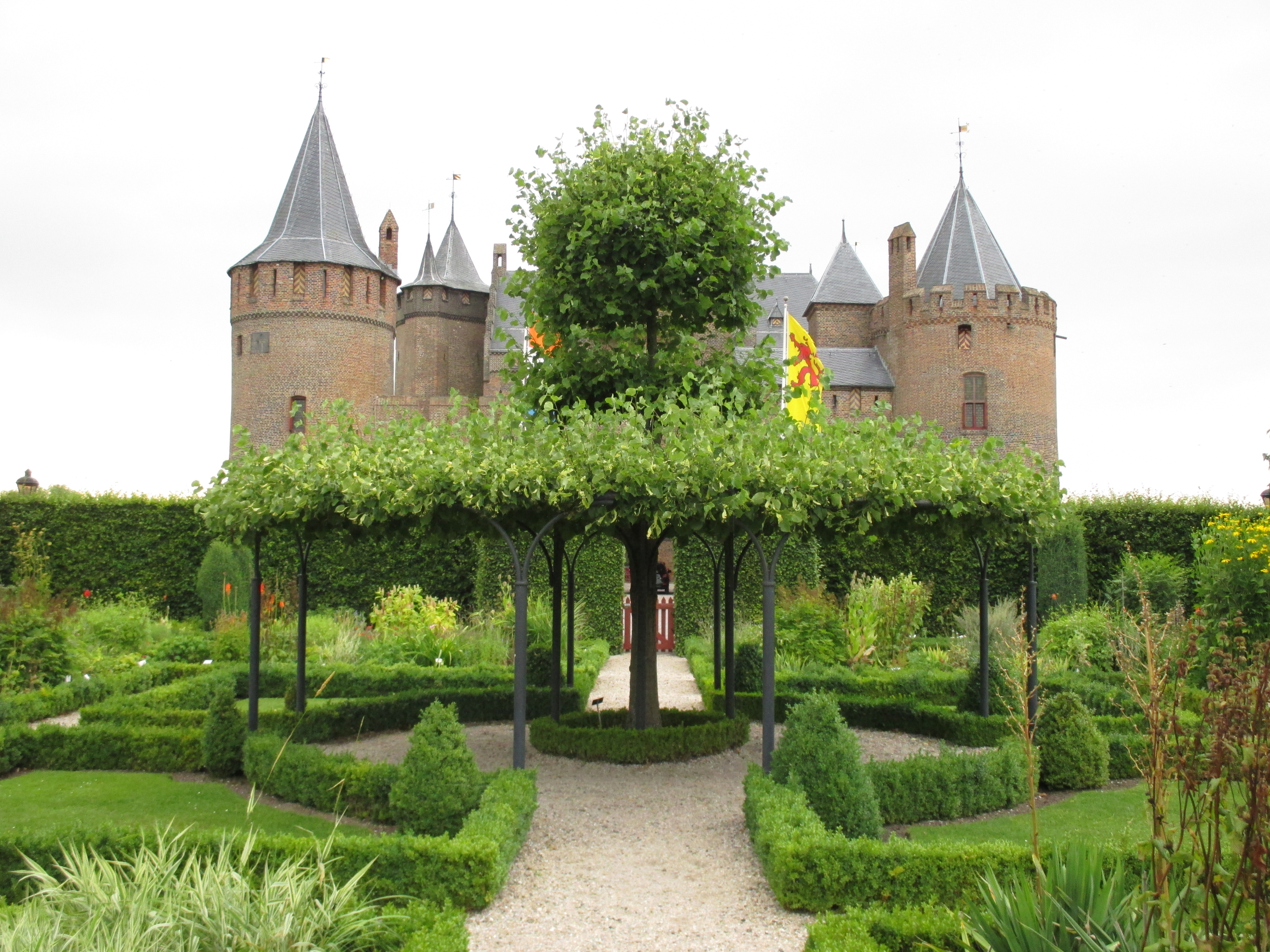 Etagelinde in de kruidhof van het Muiderslot te Muiden - NL